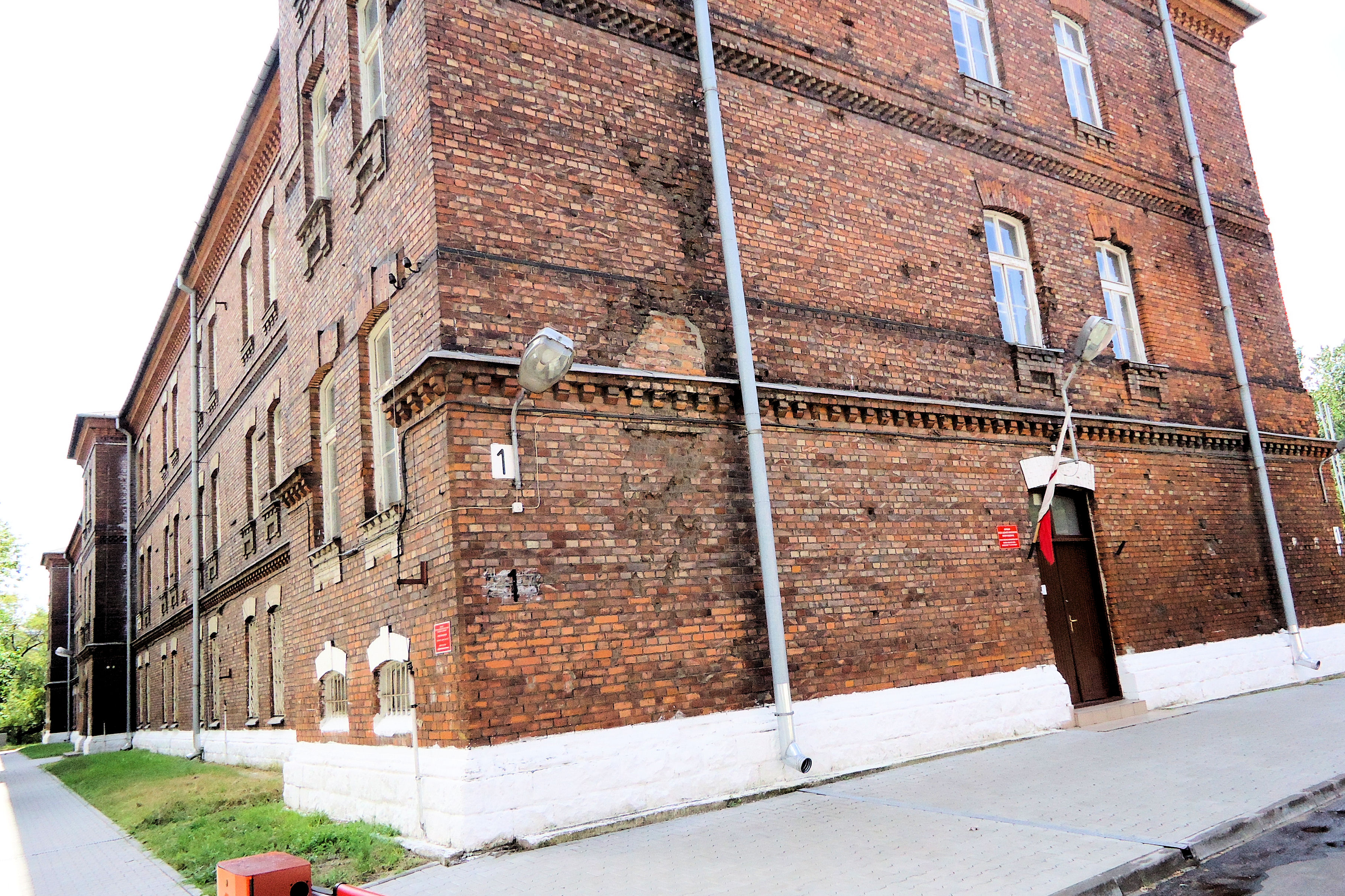 Budynek nr 1 kompleksu koszarowego 36 Pułku Piechoty Legii Akademickiej przy ul. 11 Listopada w Warszawie (stan w dniu 14 sierpnia 2011)